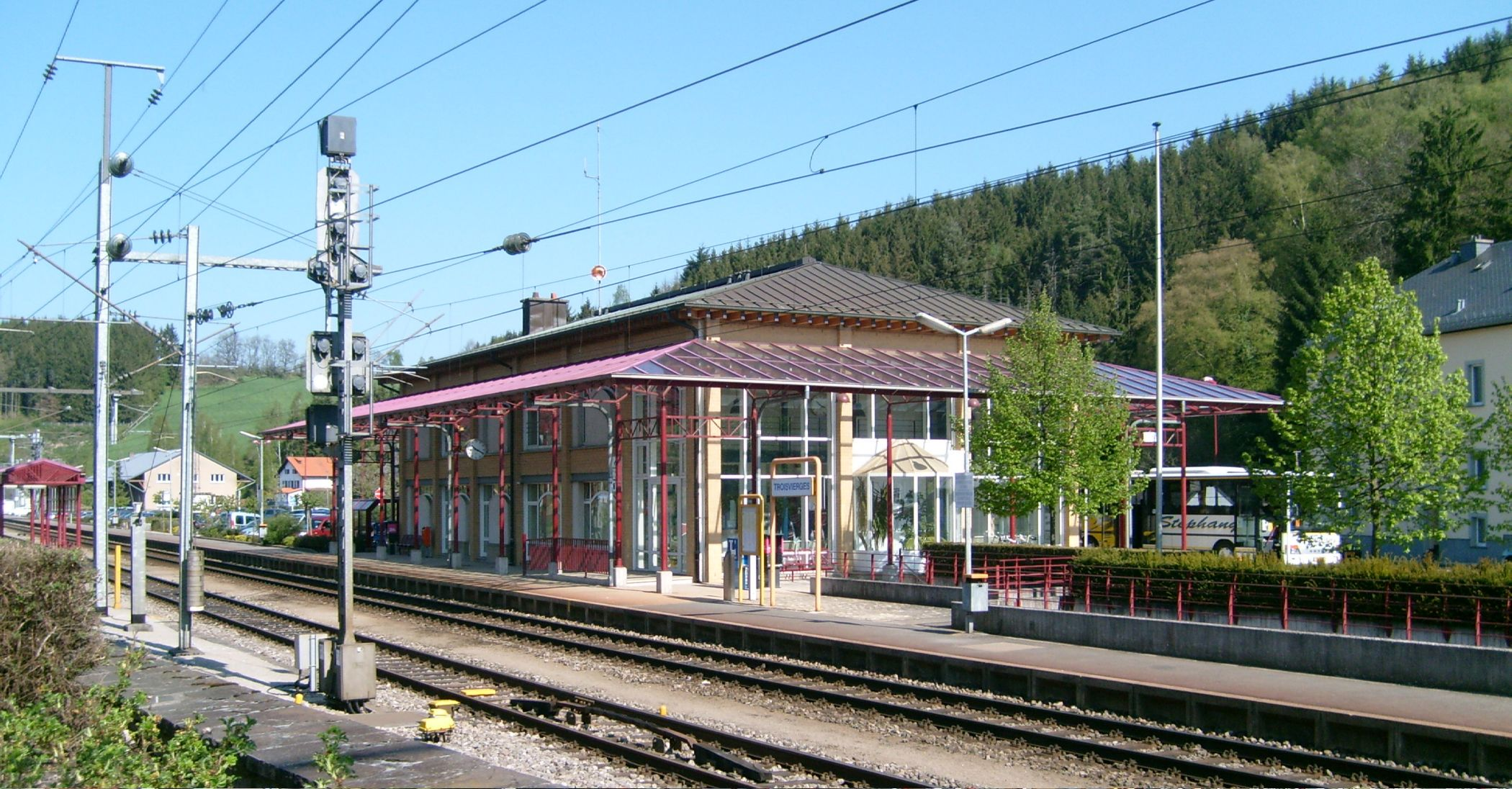 D'Gare vun Ëlwen.